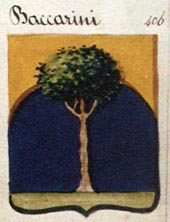 Stemma famiglia Baccarini di Faenza